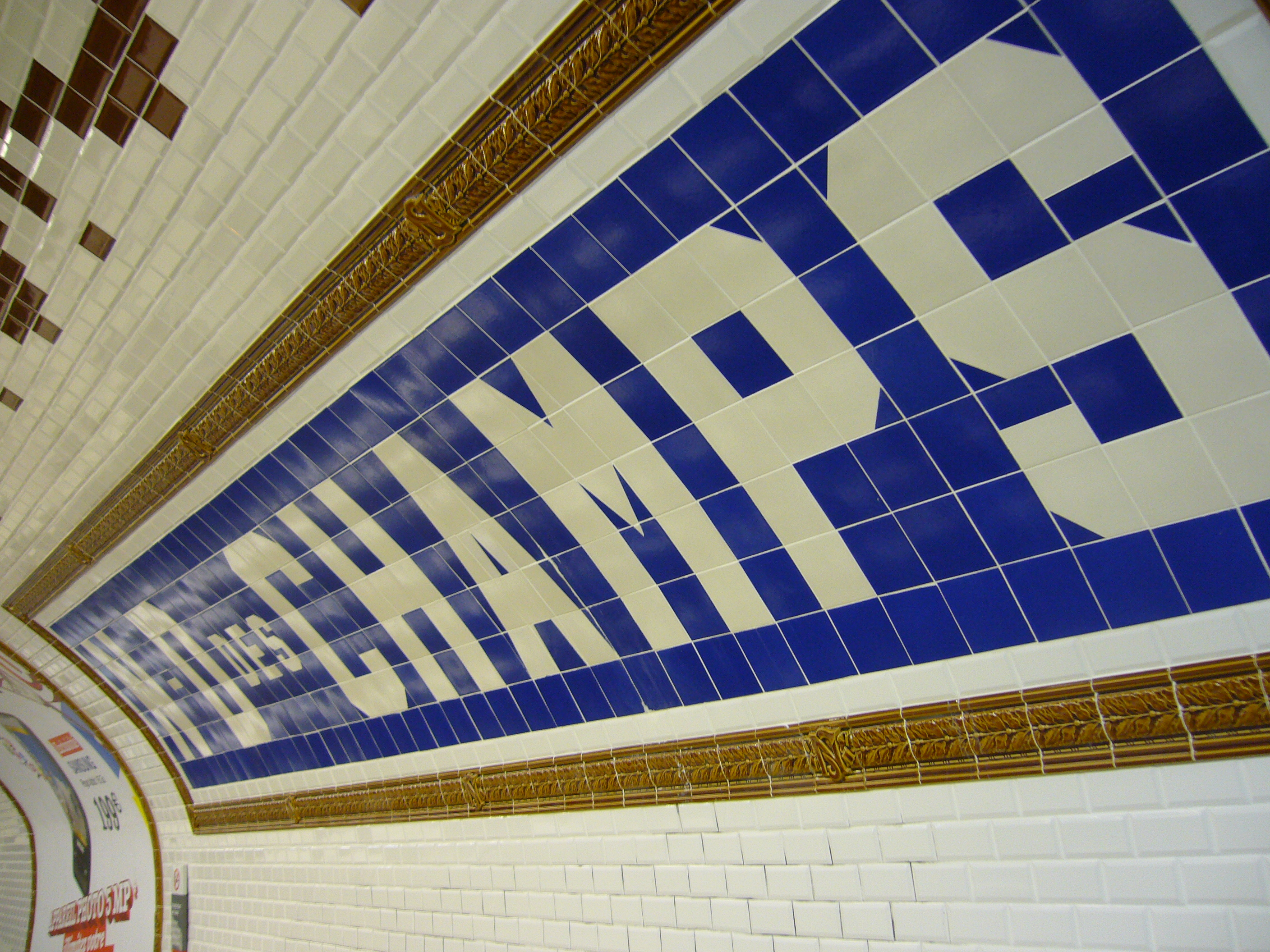 Station Notre-Dame-des-Champs sur la ligne 12 du métro de Paris.